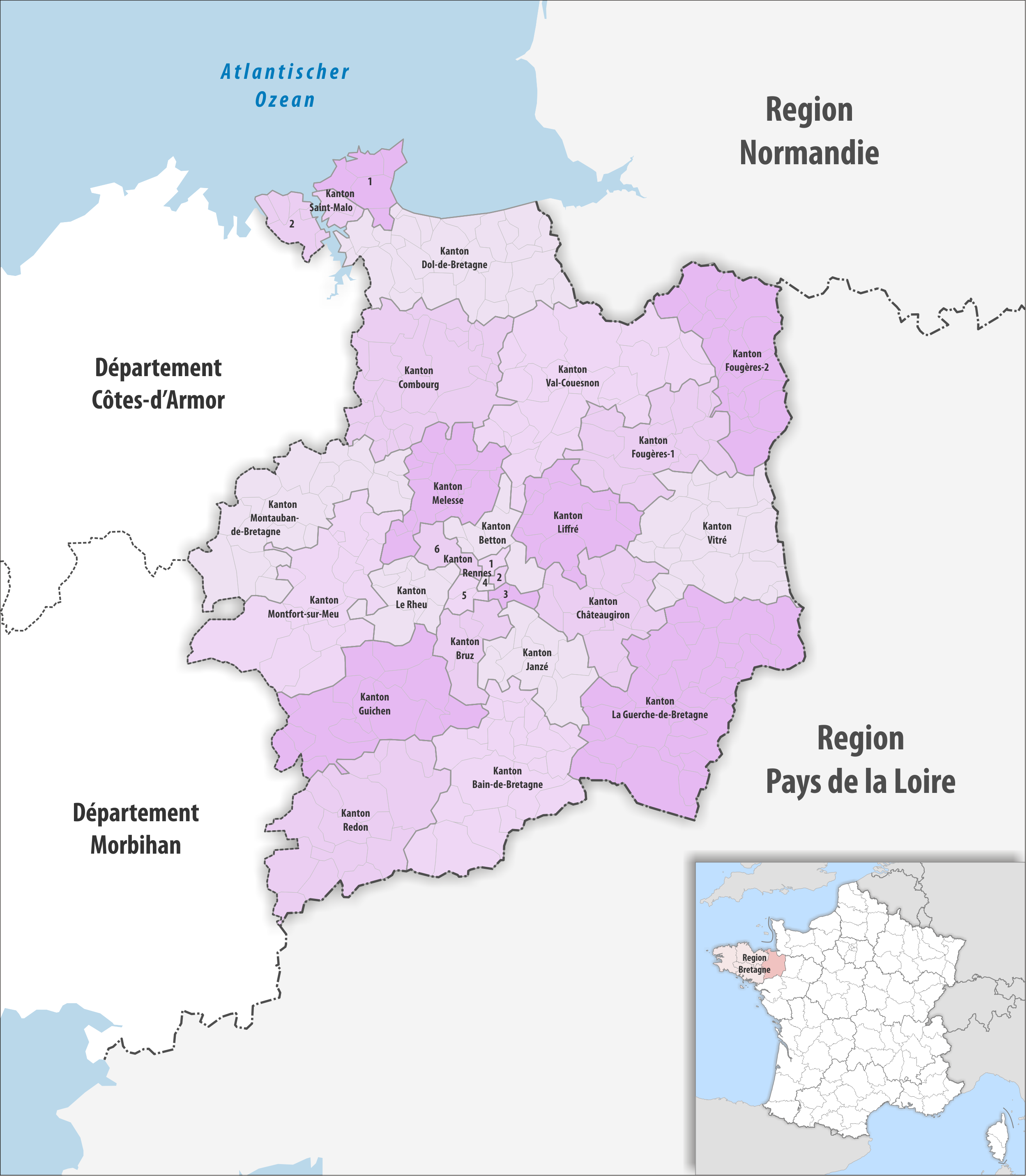 Gemeinden und Kantone im Departement Ille-et-Vilaine